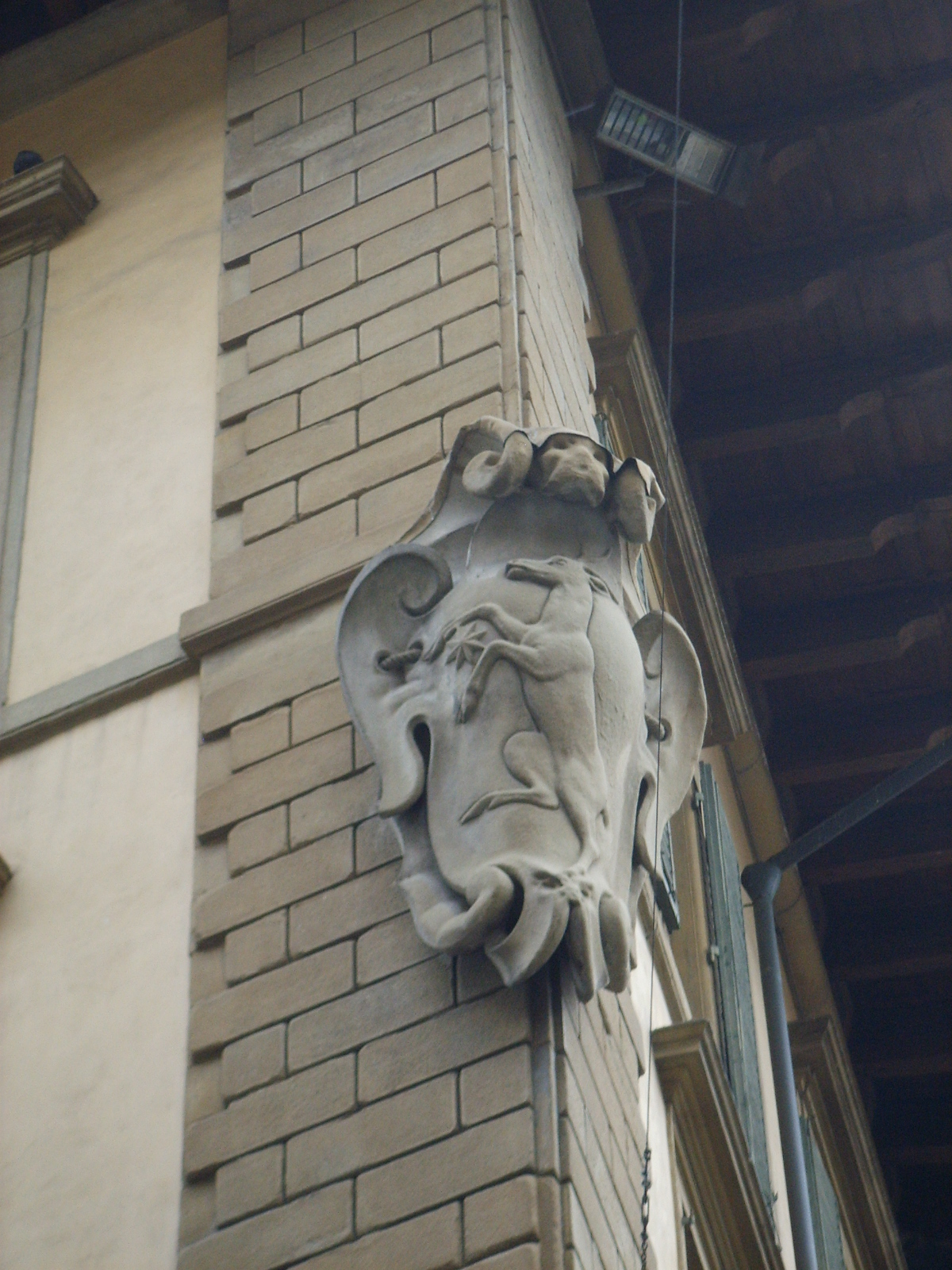 Palazzo pasquali, stemma pasquali 2